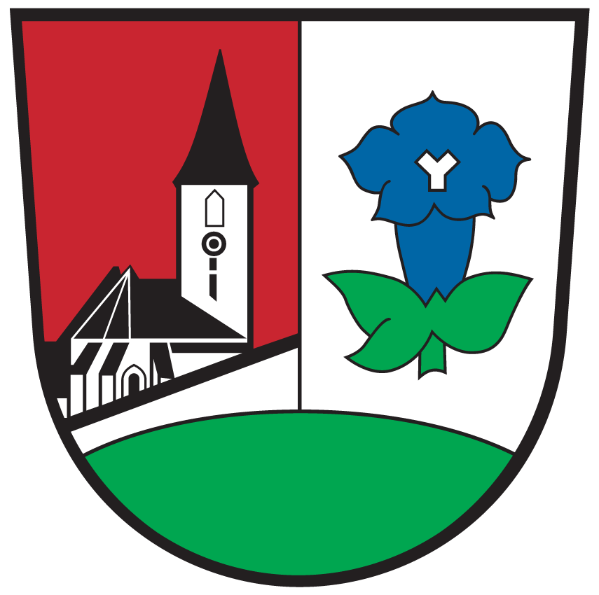 Wappen von Reichenau